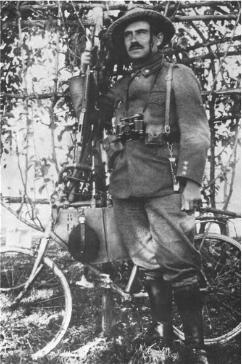 Camillo Liberanome (... - 1916), maggiore dei Bersaglieri ciclisti.